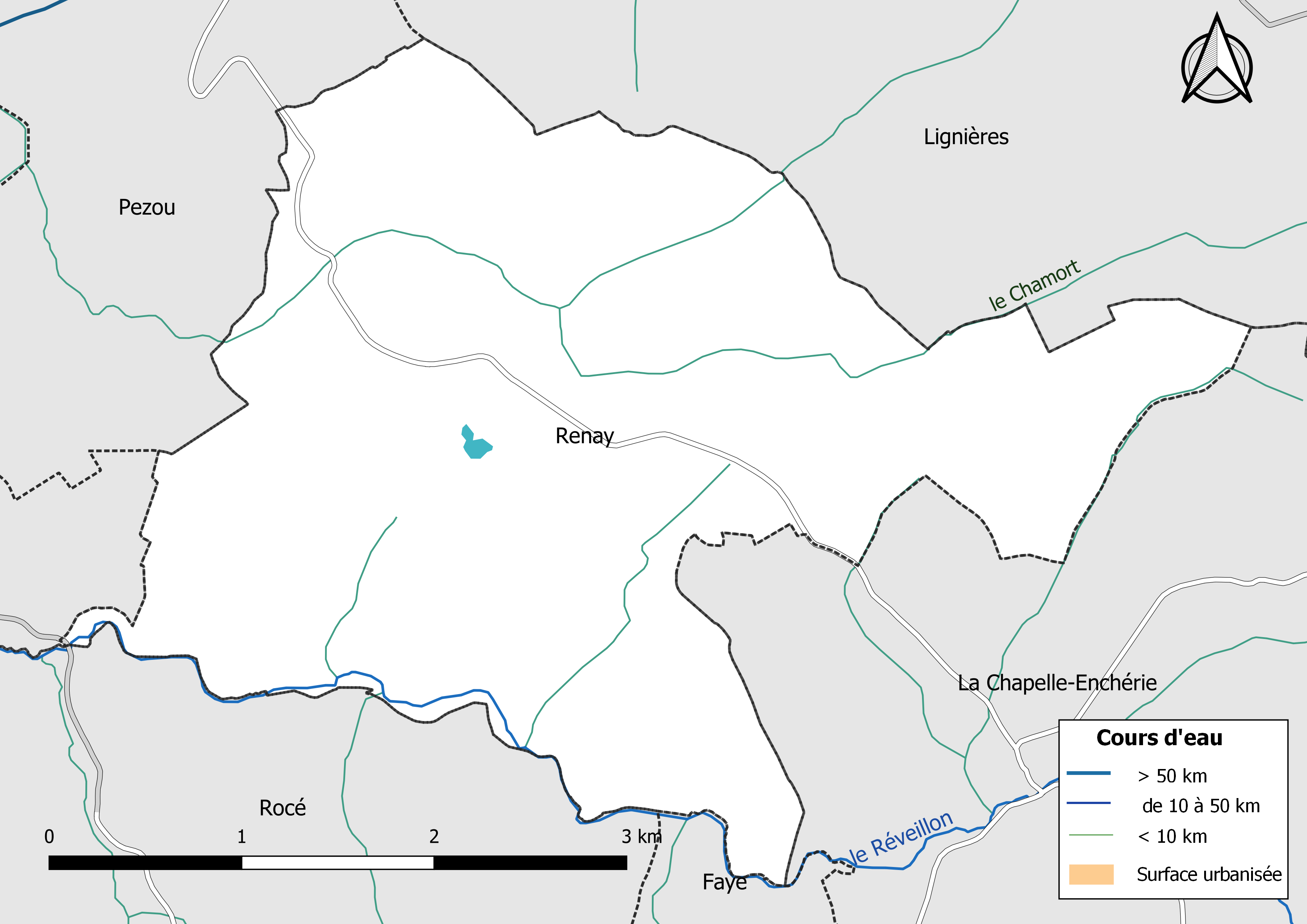 Carte du réseau hydrographique de la commune de Renay (Loir-et-Cher, France).